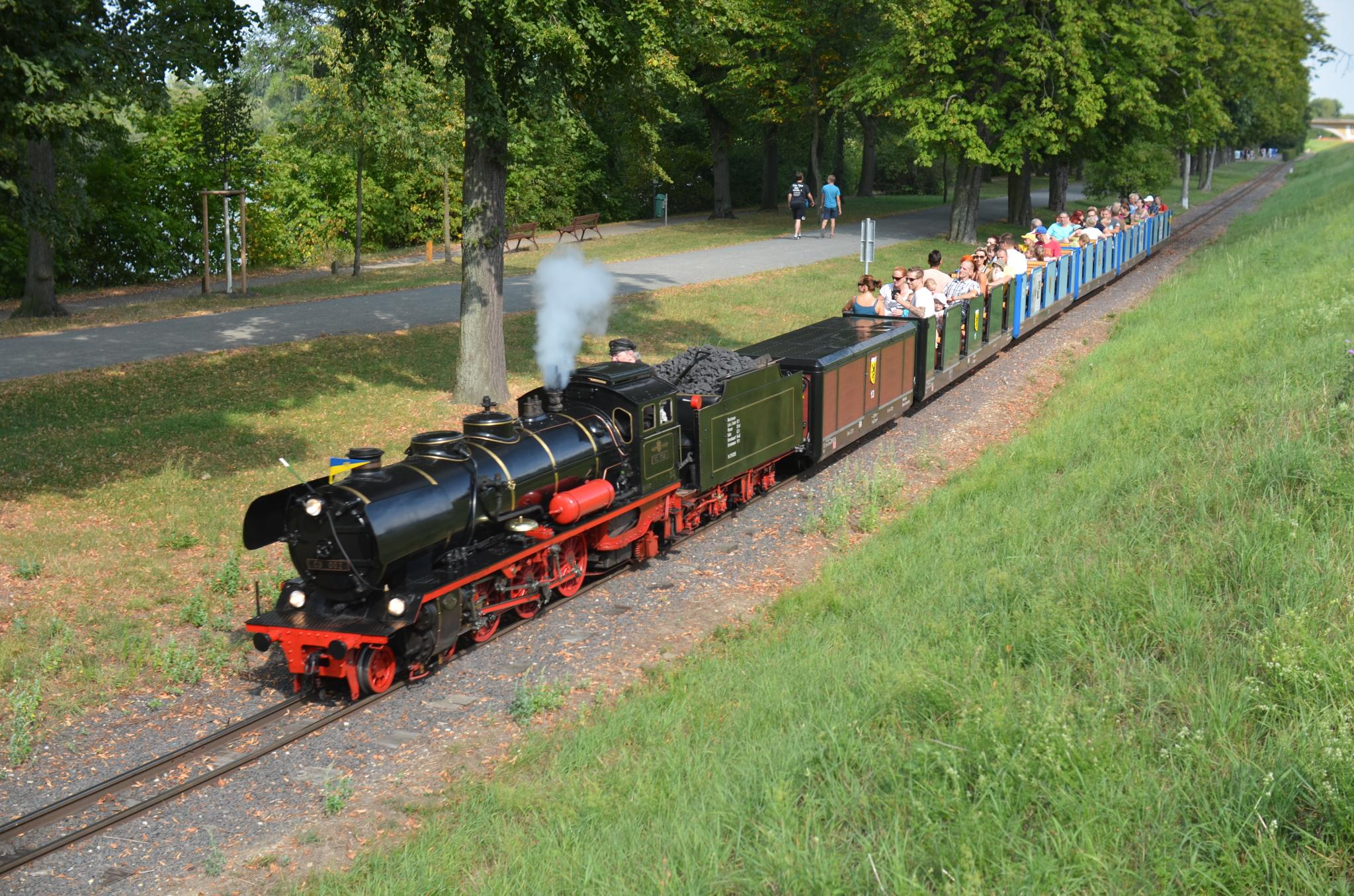 Parkeisenbahn Auensee